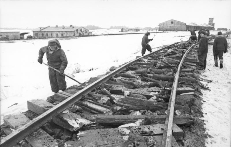 Rußland, bei Witebsk; März 1944; PK 697